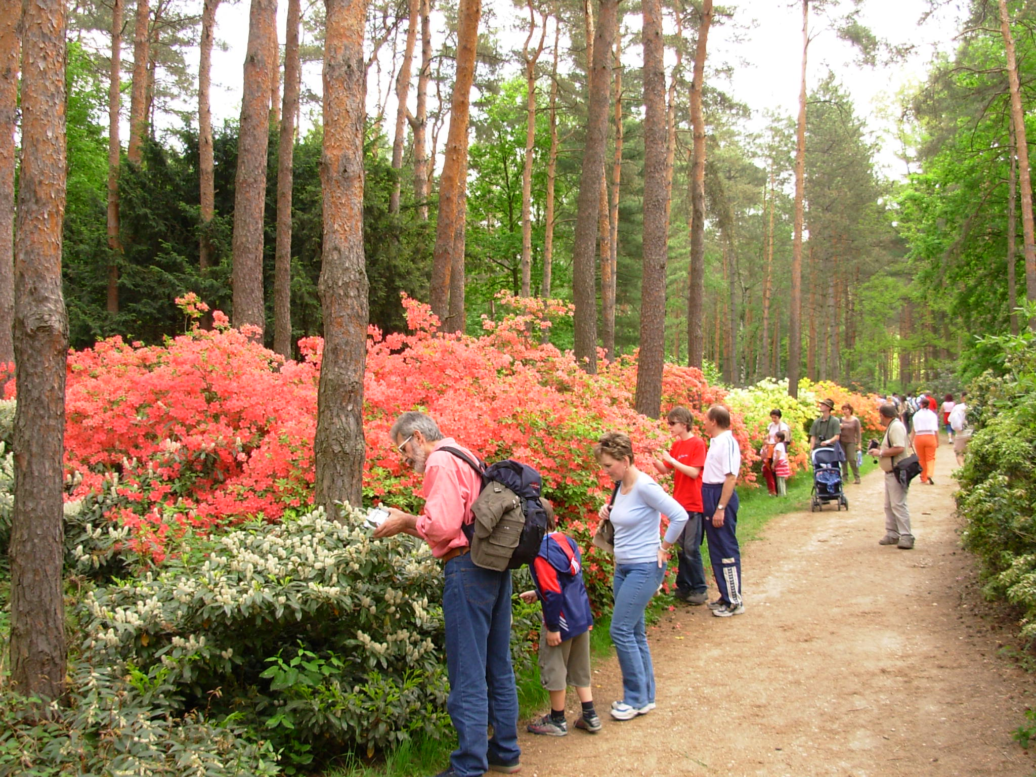 Kám. Jeli Arborétum. Rhododendron